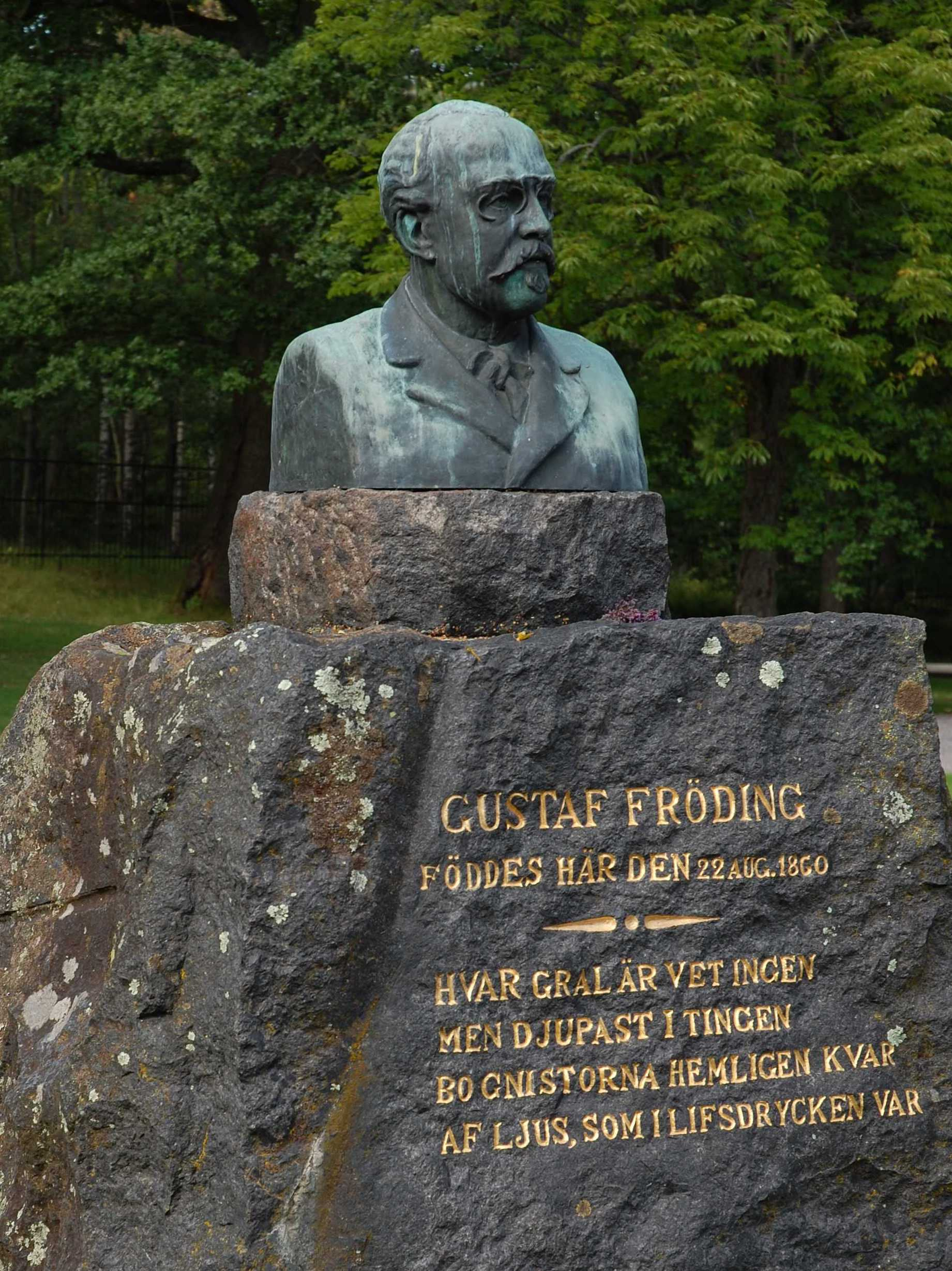 Gustav Frödings staty vid Alsters herrgård